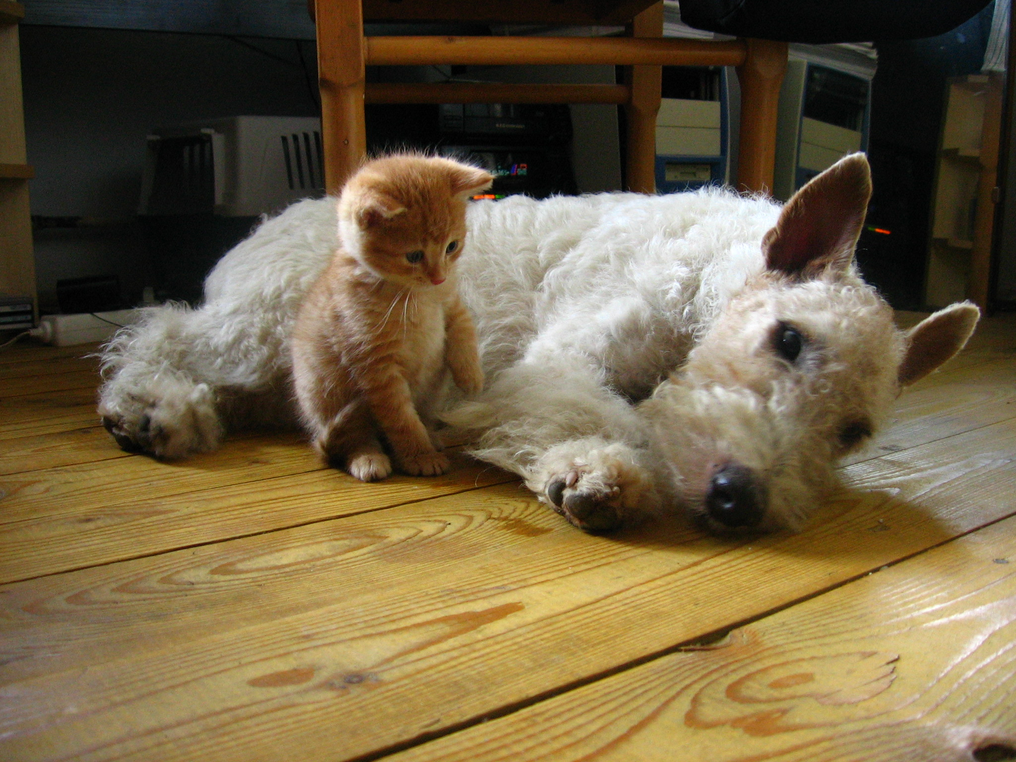 Popis: Foxteriér Alex s kocúrom Merlinom Zdroj: vlastná fotografia Dátum: 16.10.2005 Autor: Prskavka Povolenie: PD Iné verzie tohto súboru: nie